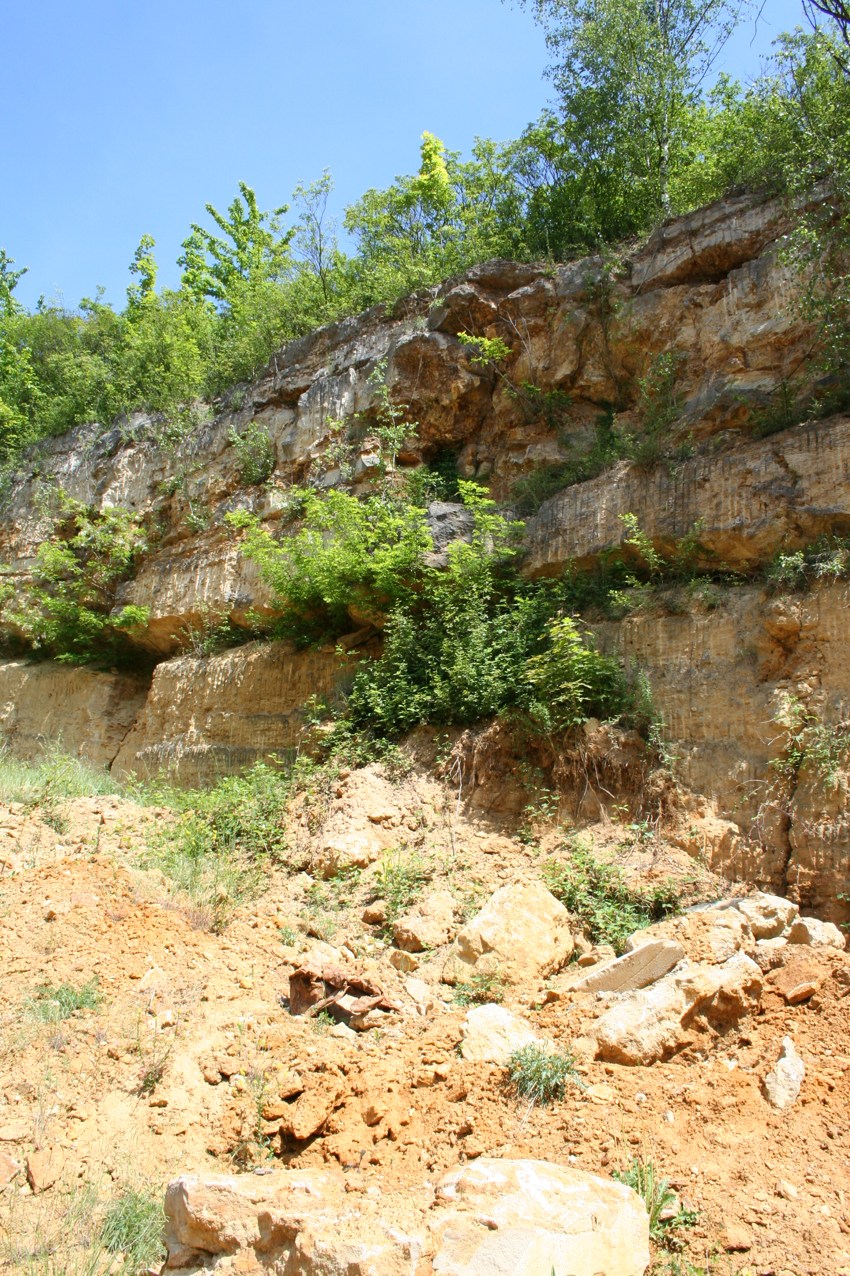 Gelände des ehemaligen Steinbruch Haas im Travertinpark in Stuttgart